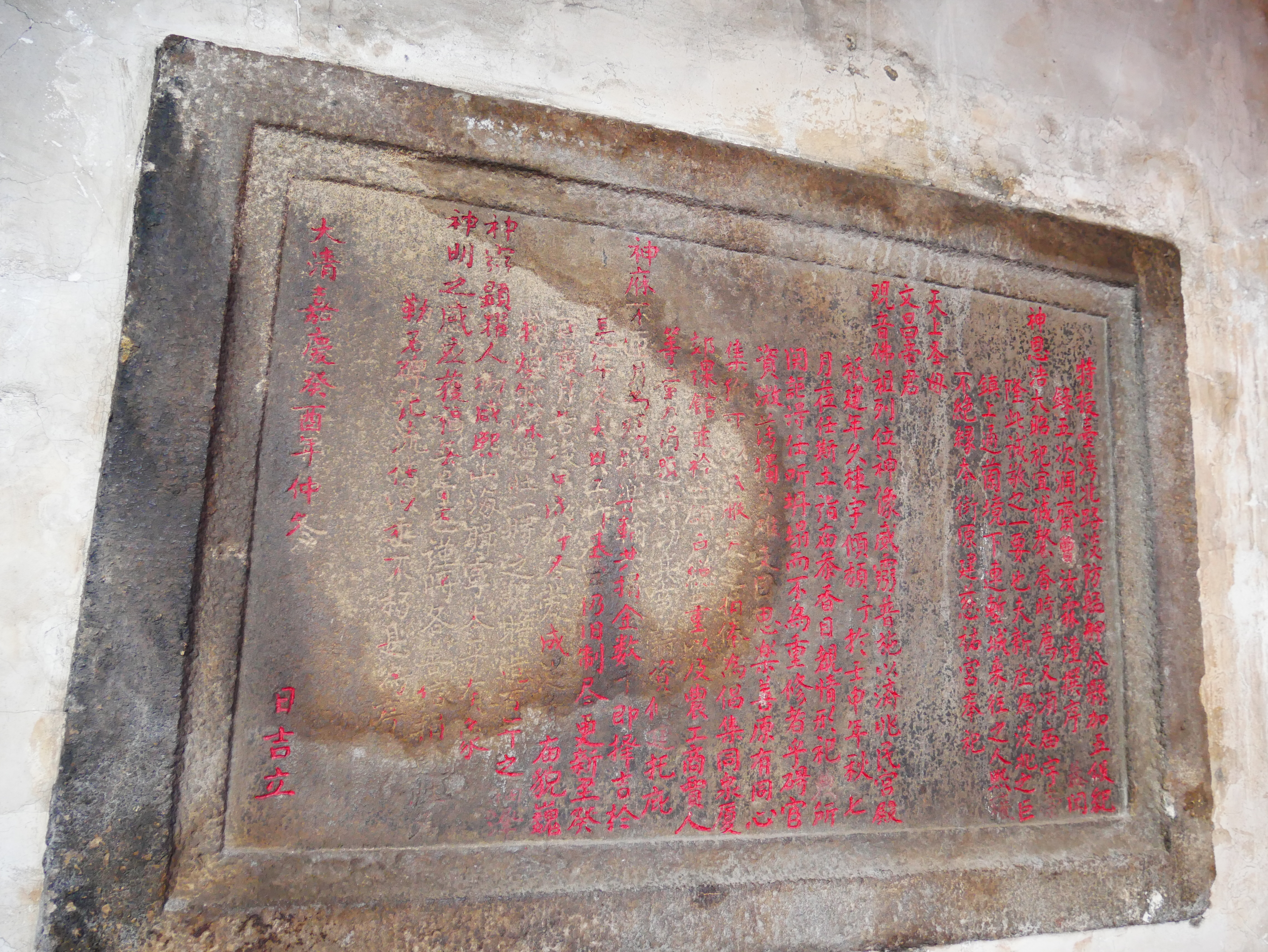 重修慈祐宮碑記（1813），新北市新莊區榮和里